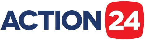 Το νέο λογότυπο του Action 24 από το 2014